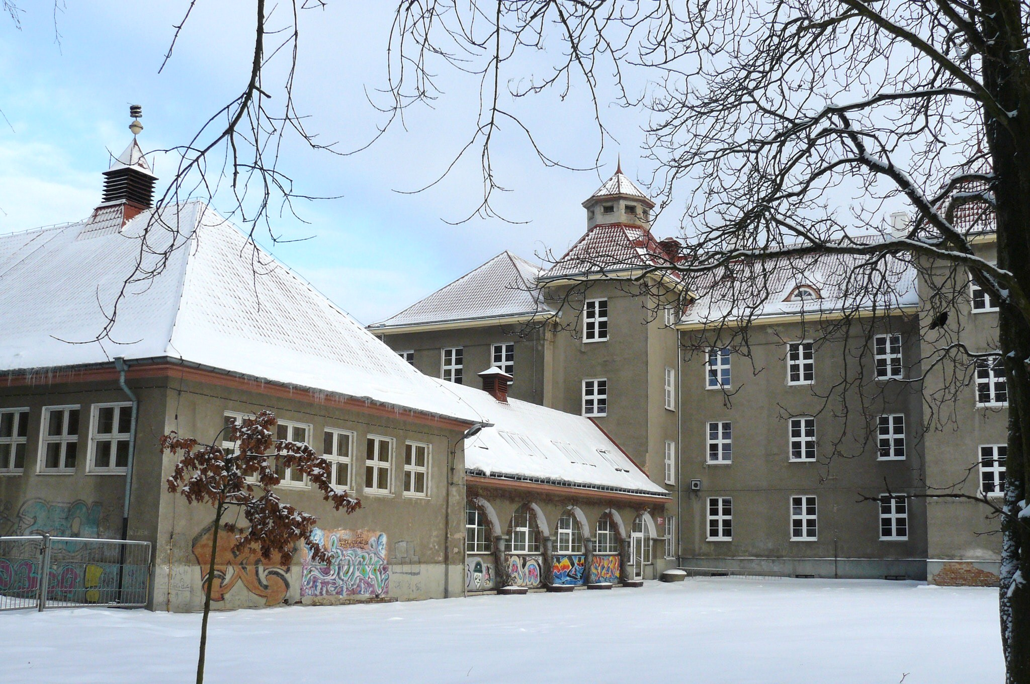 Poznan, Bonin, school